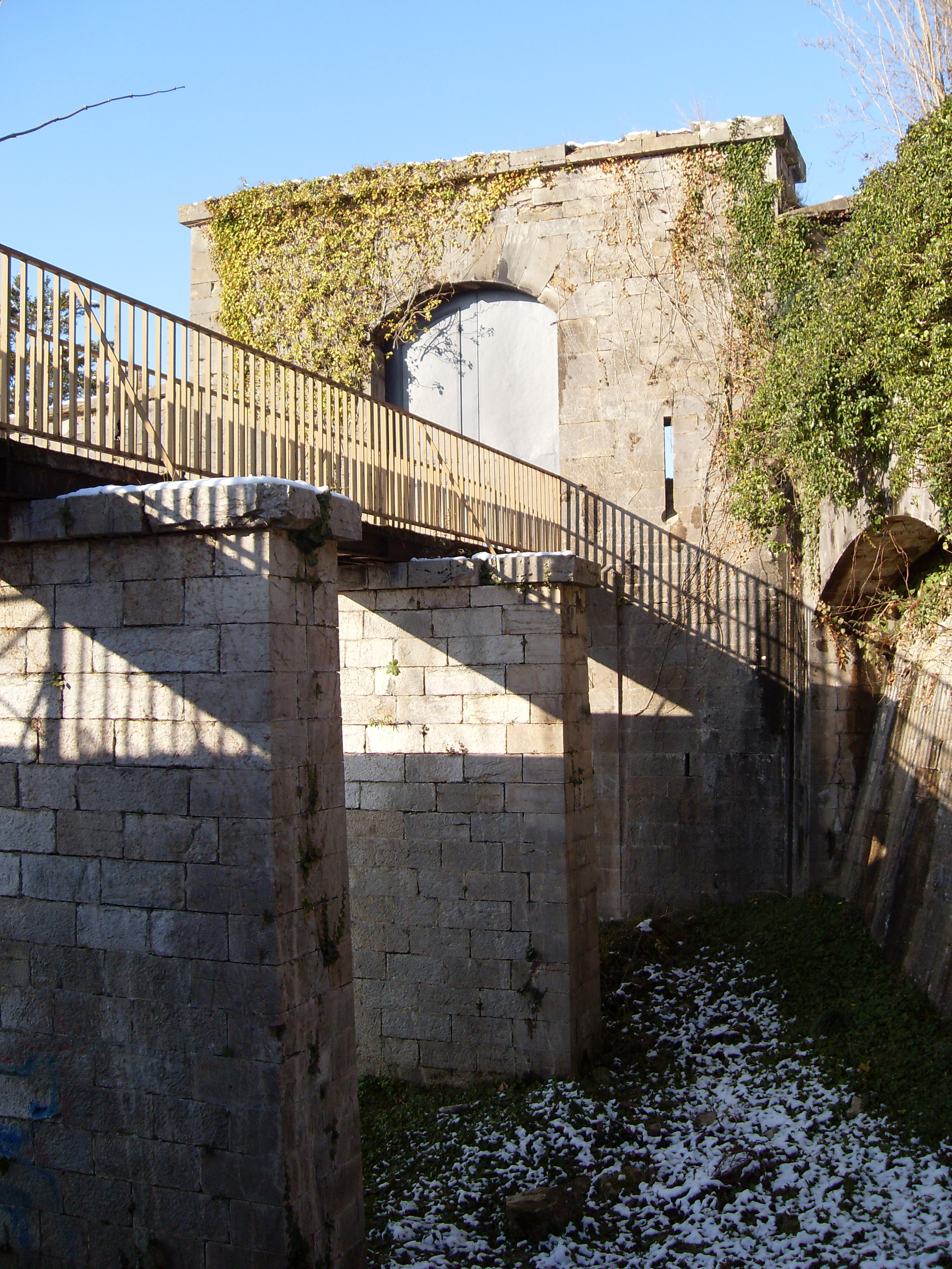 Le Fort Beauregard à Besançon.